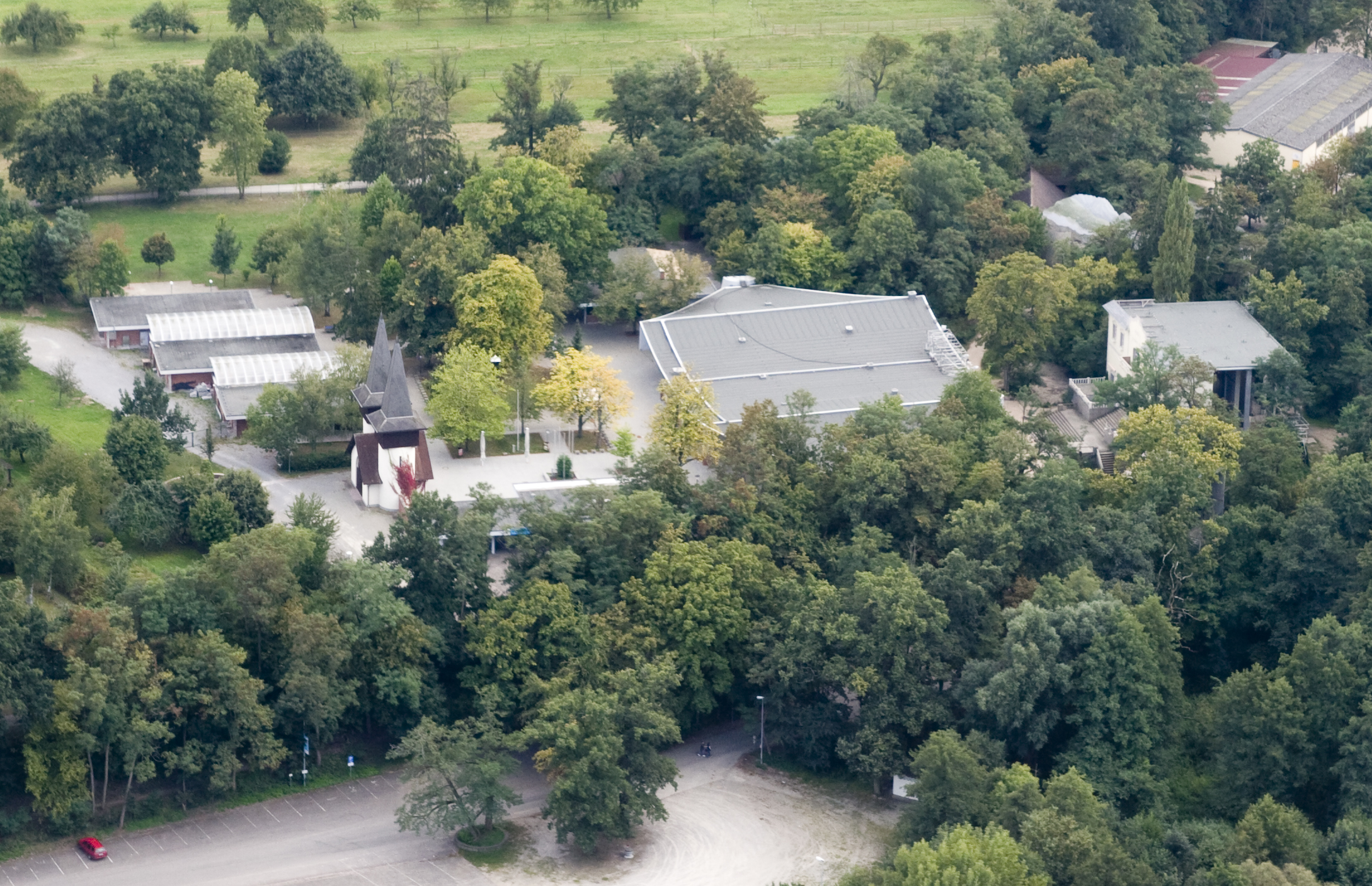 Gelände der Ötigheimer Volksschauspiele.